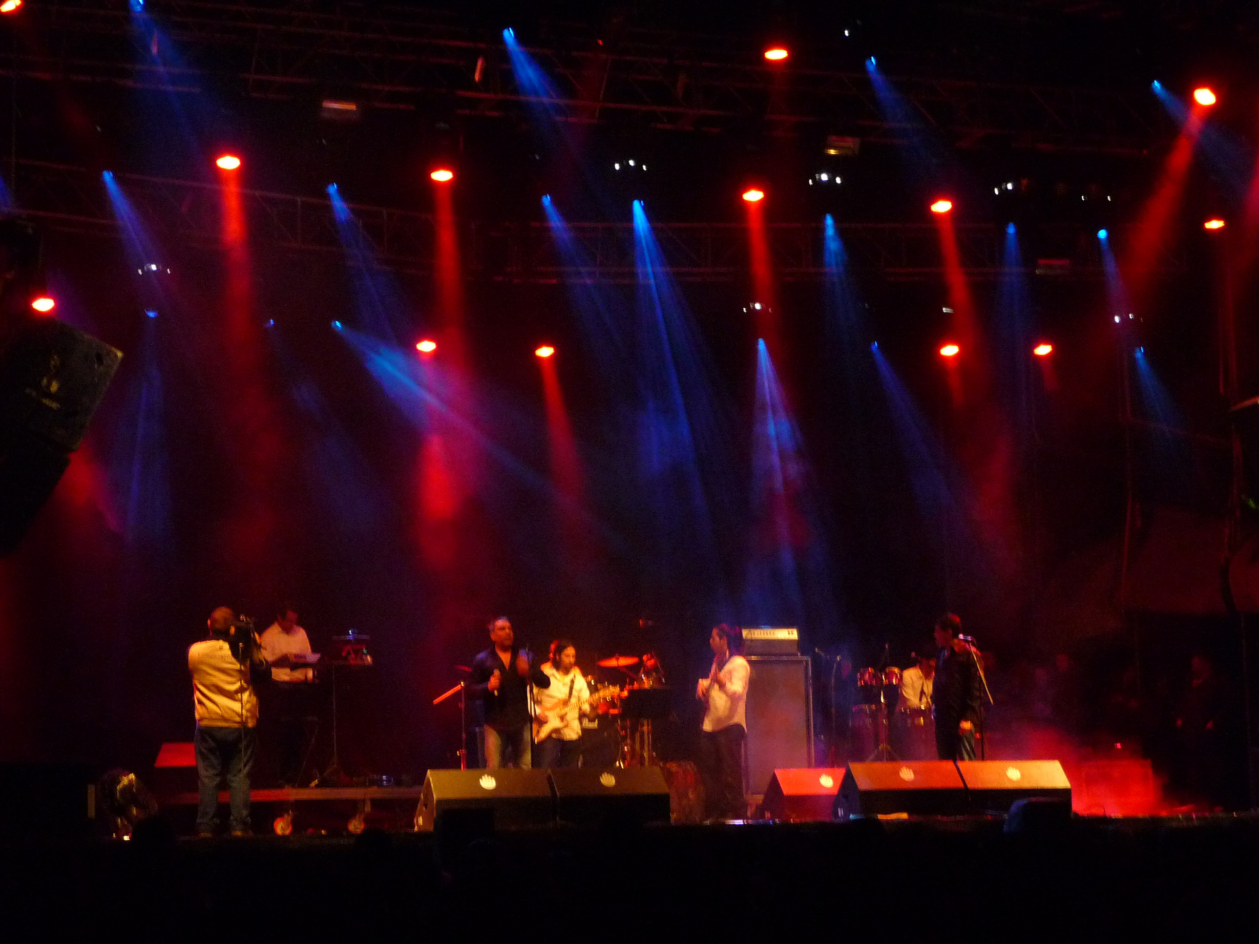 Los Chunguitos en Extremúsica 2009